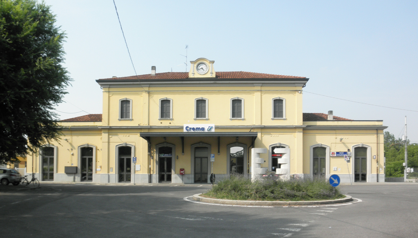 Il fabbricato viaggiatori della stazione di Crema